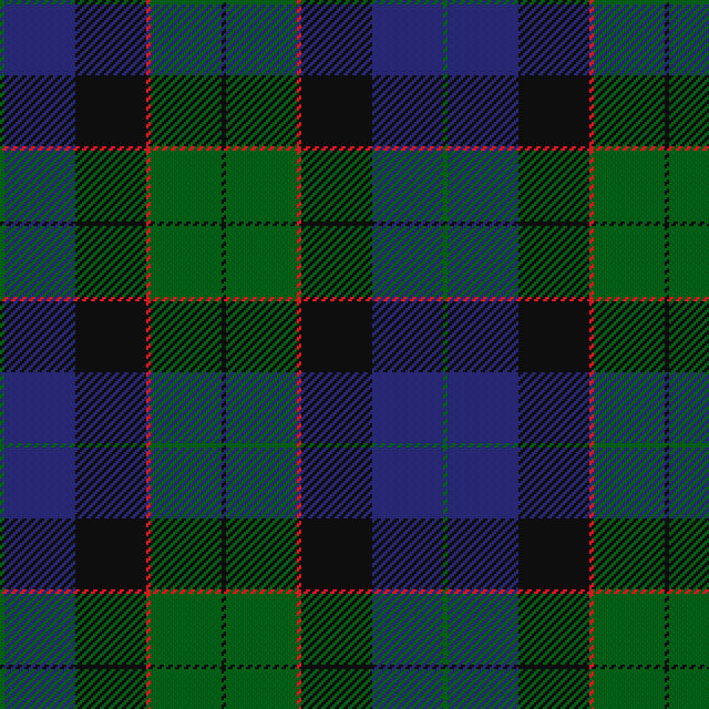 G/2 B32 K32 R2 G32 K/2